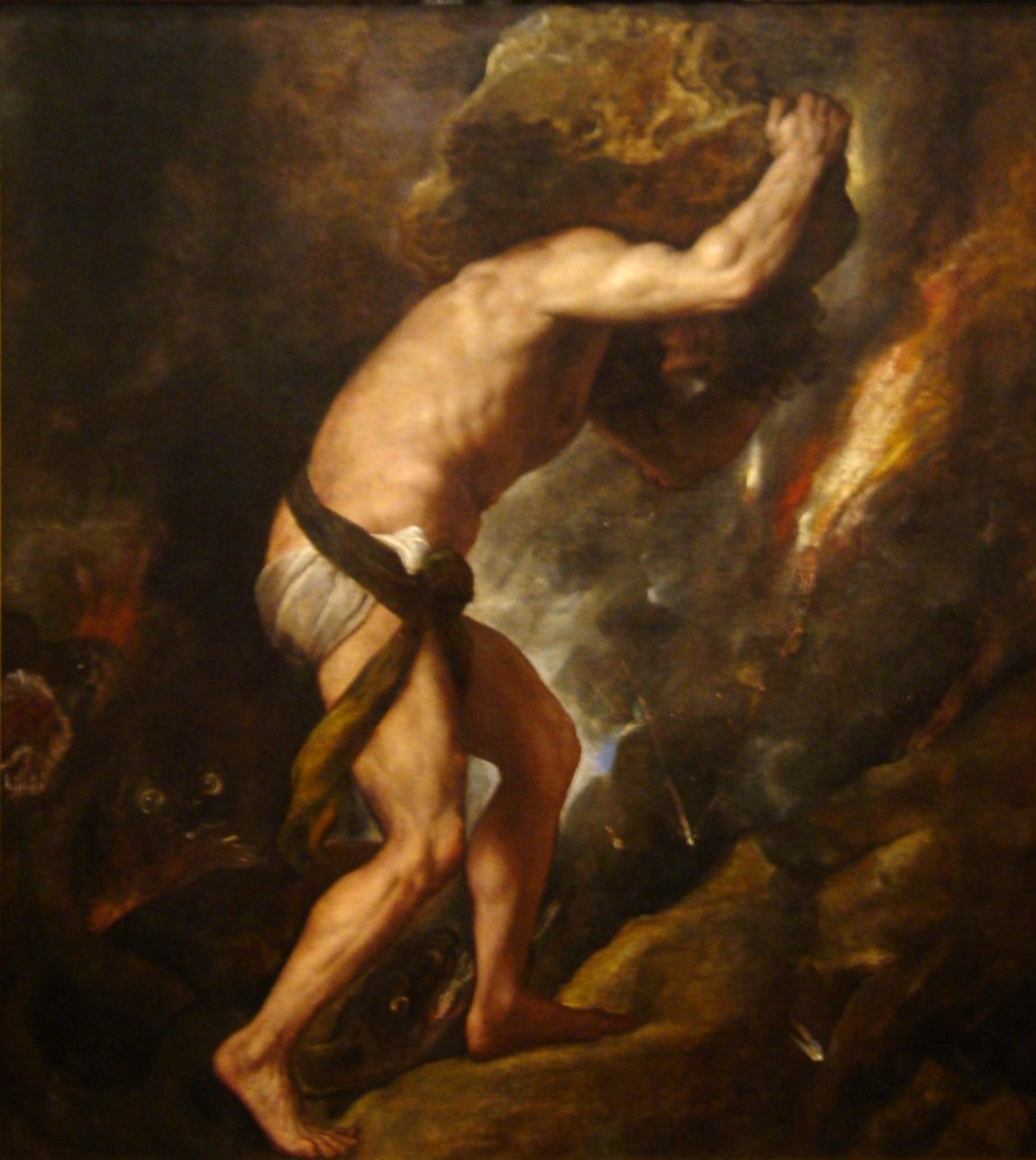 La obra representa a Sísifo, rey de Éfira y condenado por Zeus a hacer rodar con su cabeza y empujando una gran roca cuesta arriba, que continuamente se precipitaba hacia abajo, por haber revelado que Zeus había secuestrado a Egina.